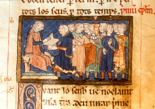 Alfons von Poitiers erkennt die kommunale Autonomie der Stadt Agen an, indem er vor den Konsuln der Stadt auf das städtische Gewohnheitsrecht schwört. Er sitzt auf einem Podest und legt die rechte Hand auf das Buch. Der Konsul welcher das Buch hält ist gezwungen auf die Knie zu gehen.